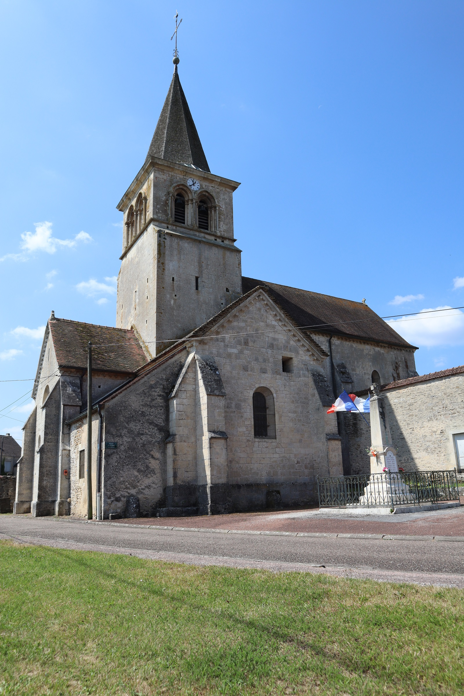 Église Saint-Pierre-ès-Liens d'Arbot (52). Extérieur. Flanc nord.